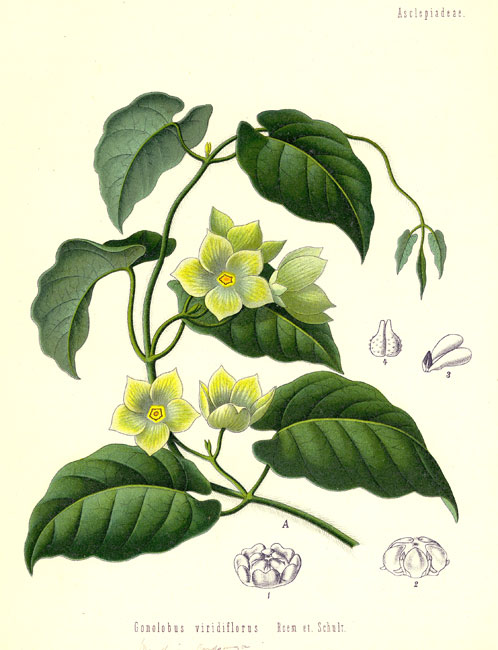 Marsdenia cundurango